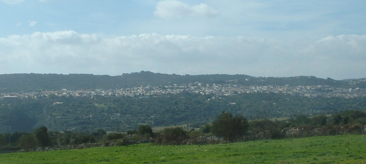 Canicattini Bagni (SR), Panorama.